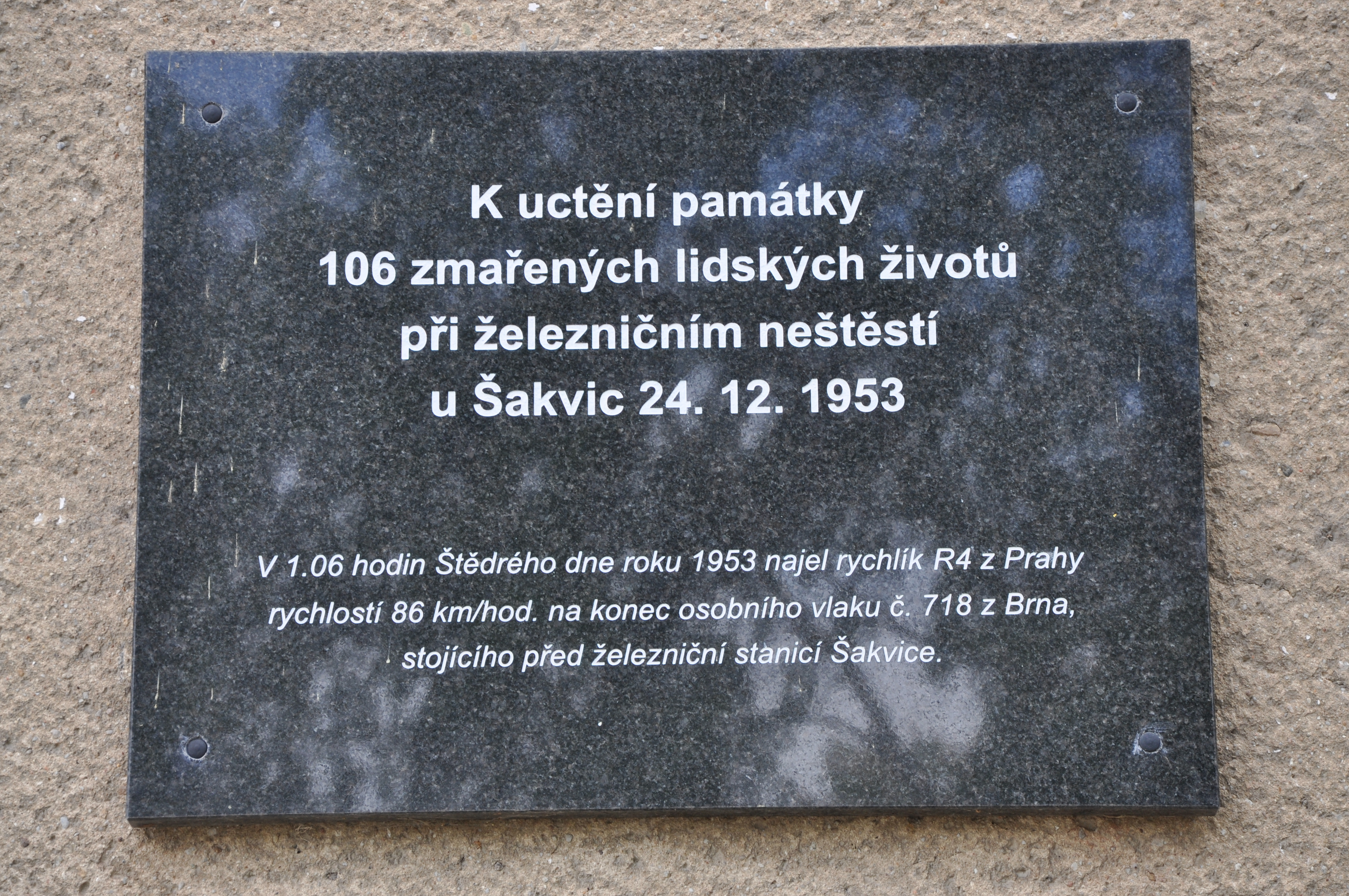 This image was acquired during the event Wikiměsto Hustopeče. Železniční stanice Šakvice, památník neštěstí